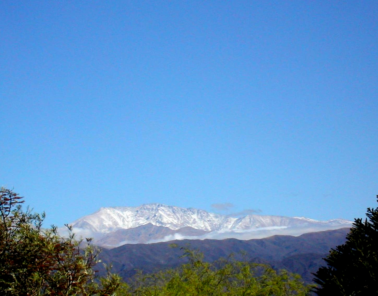 Cerro El Manchao, Ambato, Catamarca, Argentina